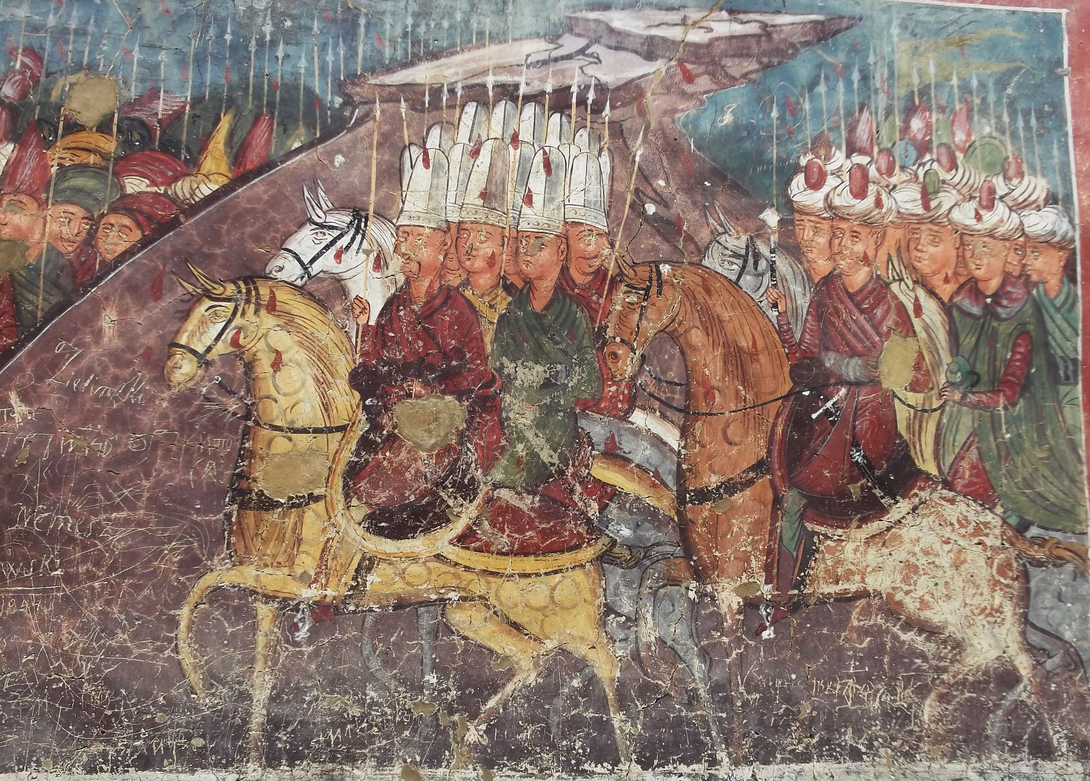 Biserica „Buna Vestire” de la Mănăstirea Moldovița, pictura exterioară - detaliu 01